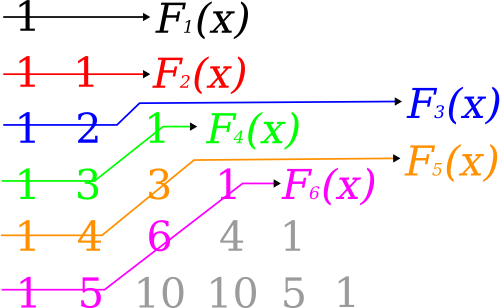 Il grafico mostra come ottenere i coefficienti dei polinomi di Fibonacci a partire dal Triangolo di Tartaglia. The graph shows how to obtain coefficients of Fibonacci's polynomials using Pascal's Triangle.